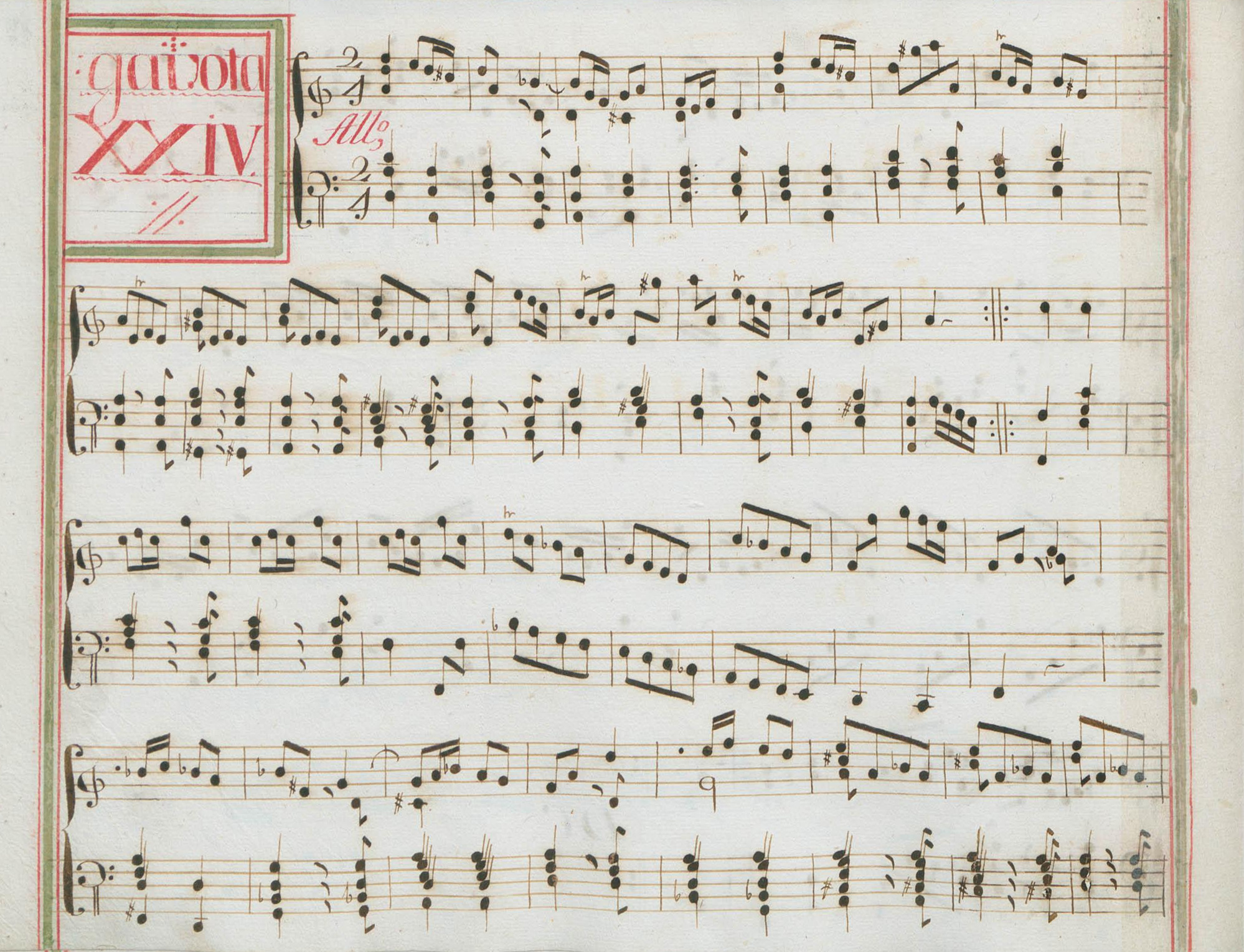 La sonate K. 64, telle qu'elle se présente dans le manuscrit de Venise, volume XIV no. 24.